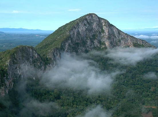 Lokasi :Mukim Pulai, Daerah Baling, Kedah. Koordinat puncak tertinggi gunung ini adalah 5°40.790’N 100°54.567’E. Gunung ini terletak di daerah Baling Sik merupakan salah satu aktiviti yang dijalankan untuk pendaki dalam negara dan juga luar negara seperti dari pelancong Korea , Jepun, Indonesia, serta dari benua lain.